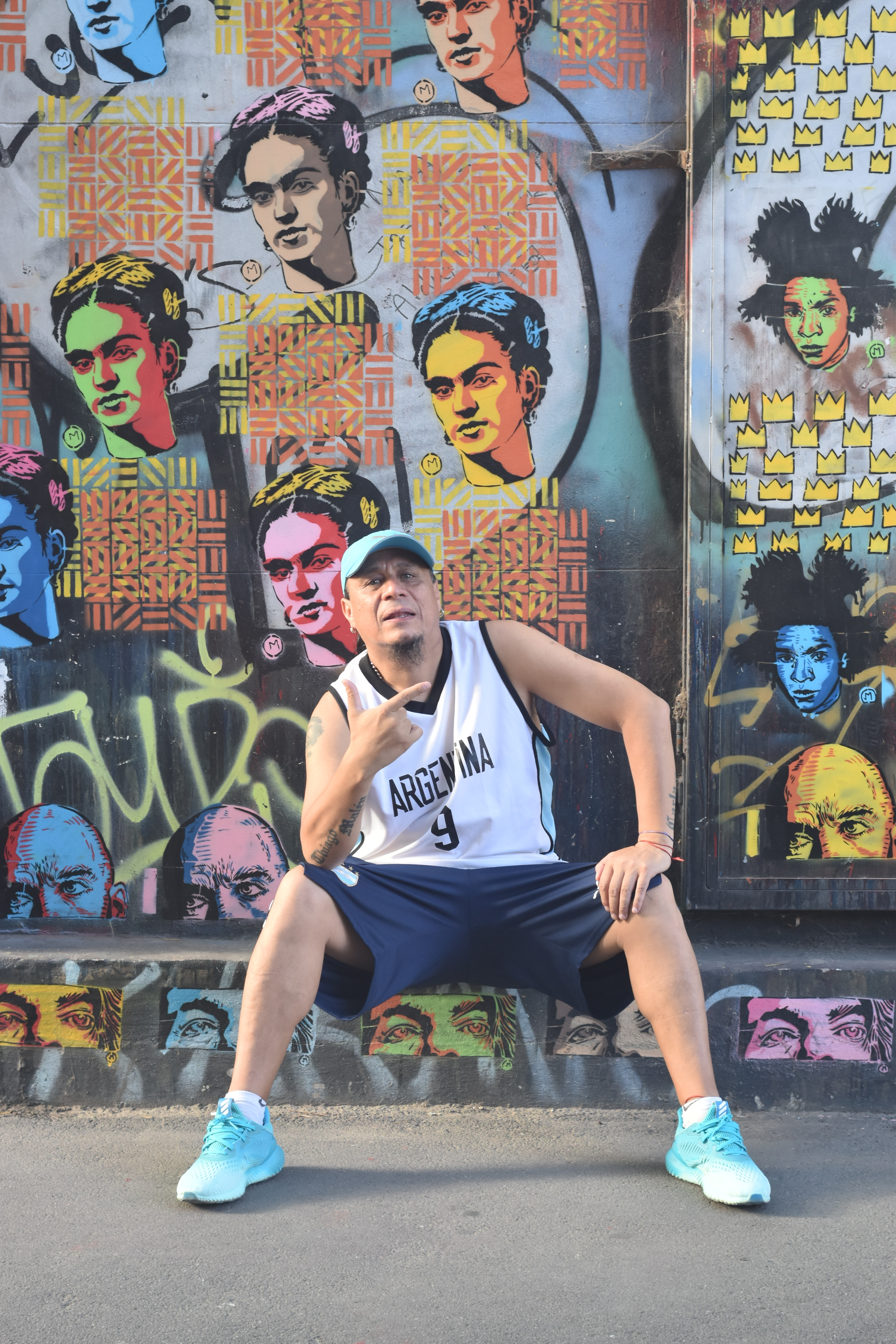 Traiko Piuner voz lider de Meta Guacha